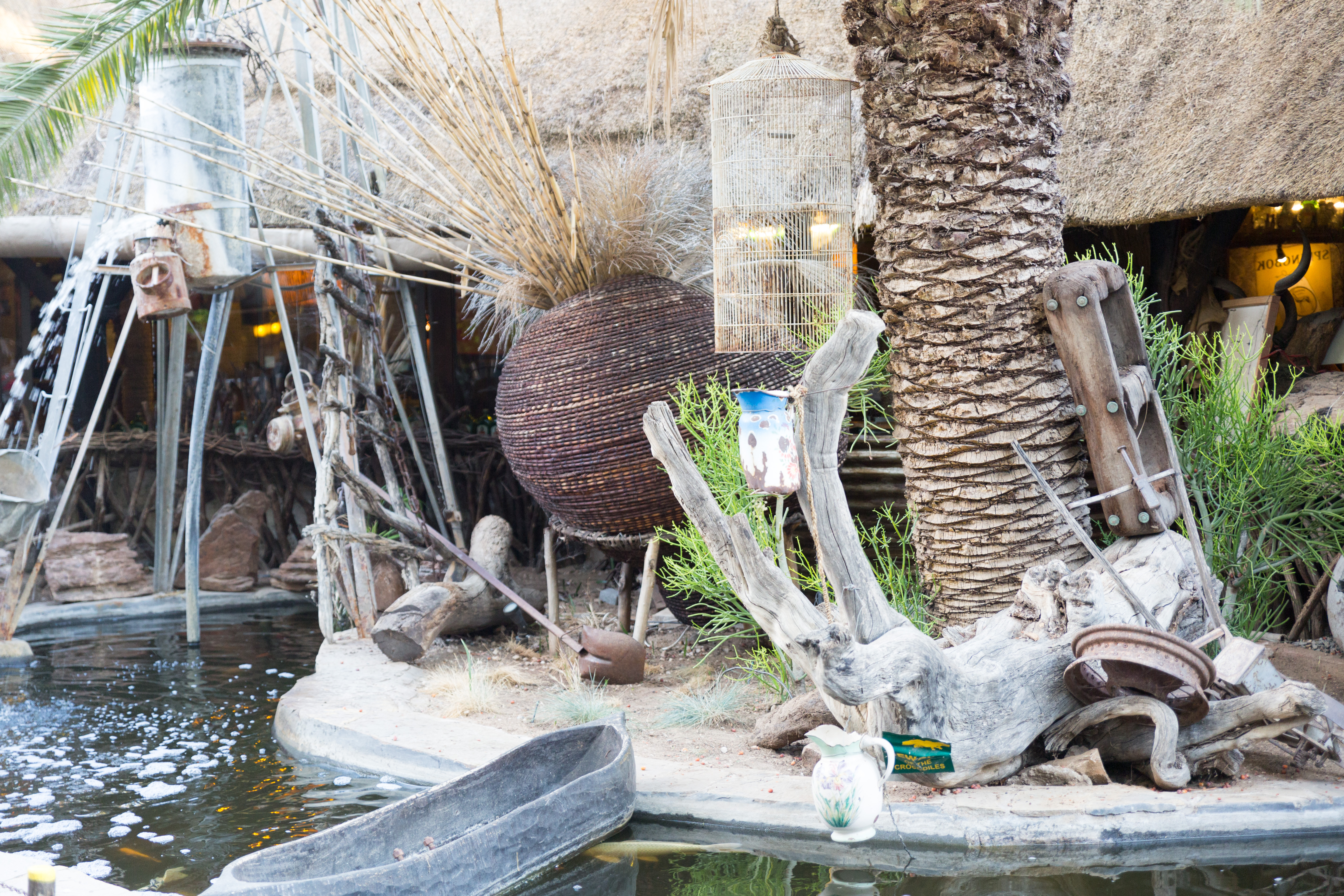 Joe's Beerhouse